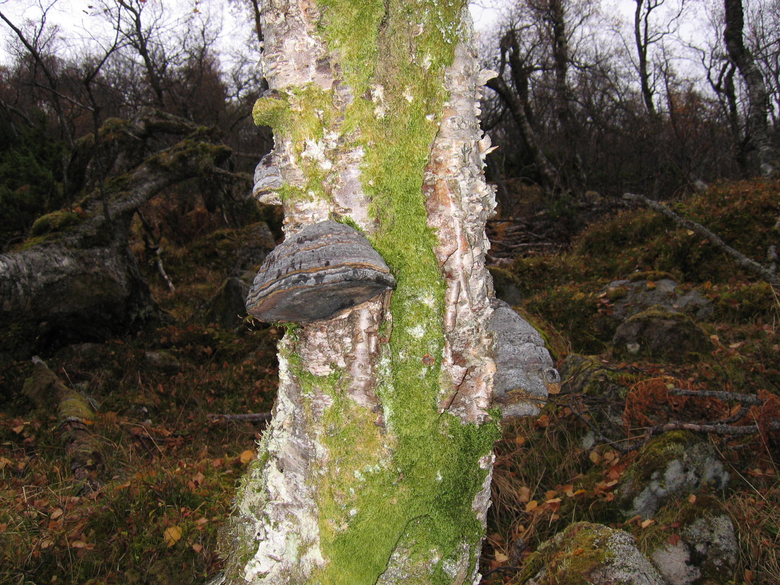 Fomes fomentarus, Knuskkjuke Vestnorsk bjørkeskog